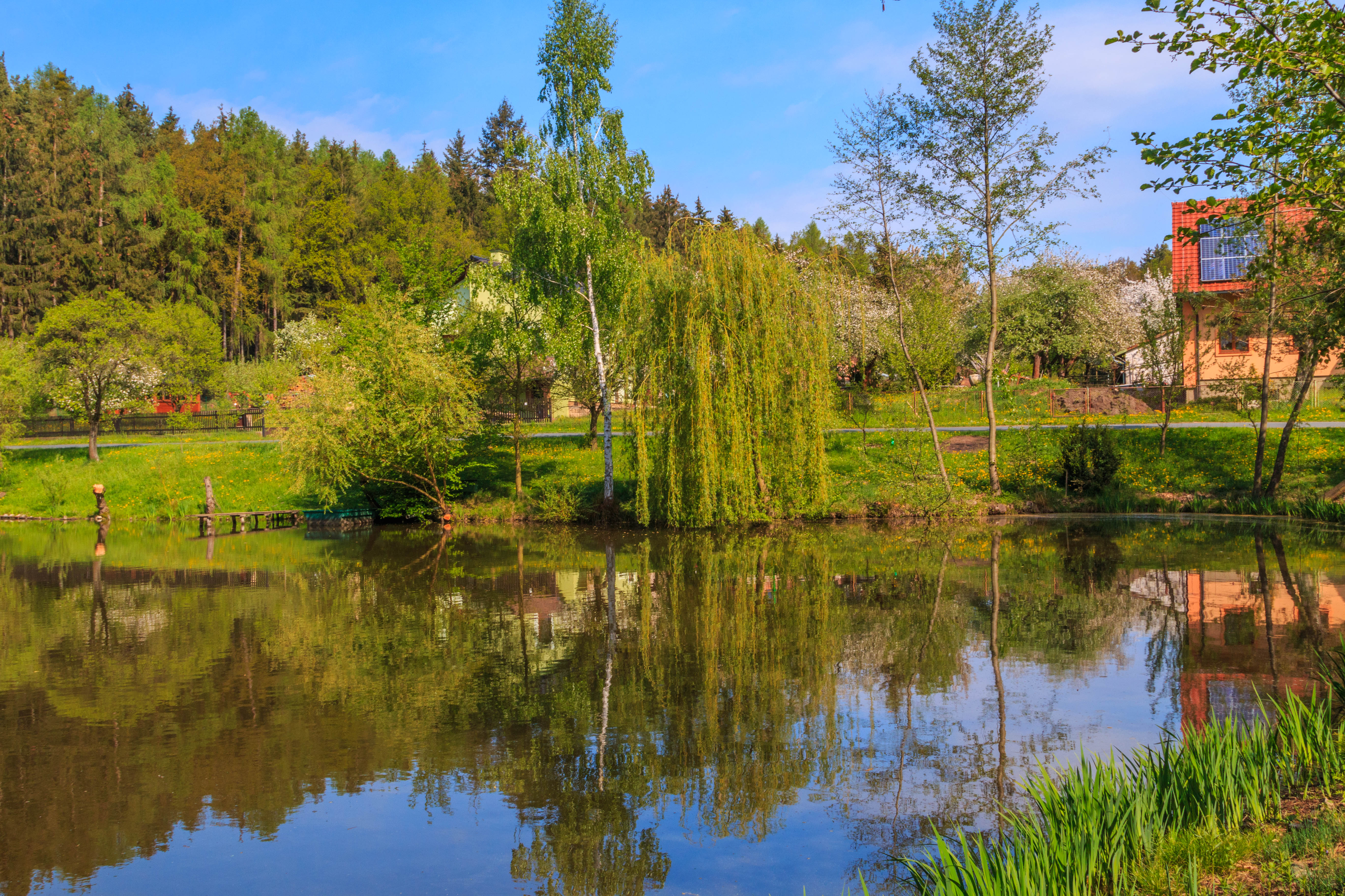 Rybník Stružník v osadě Ledec Project: Vodstvo.